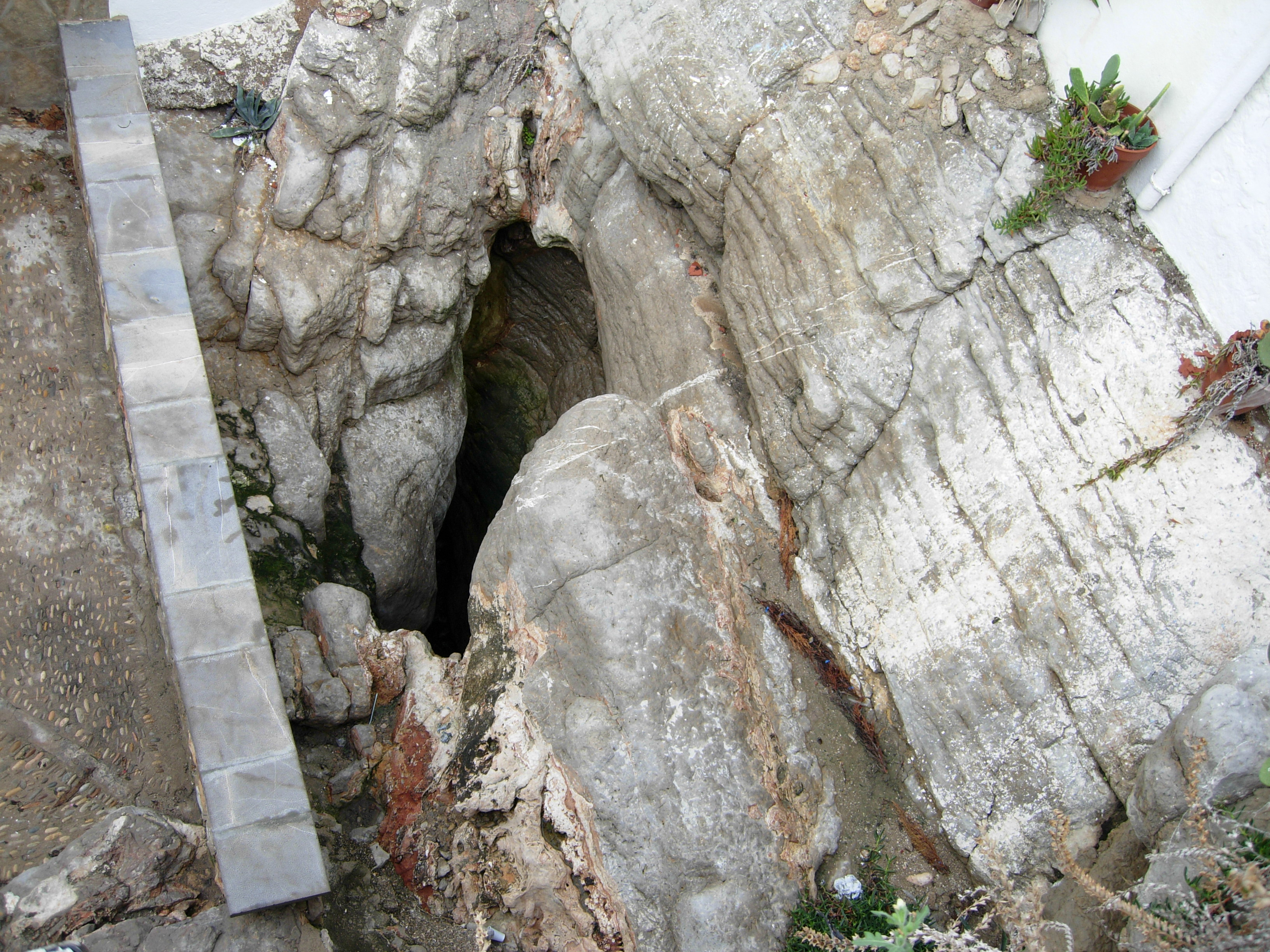 Peñiscola - le Bufador.